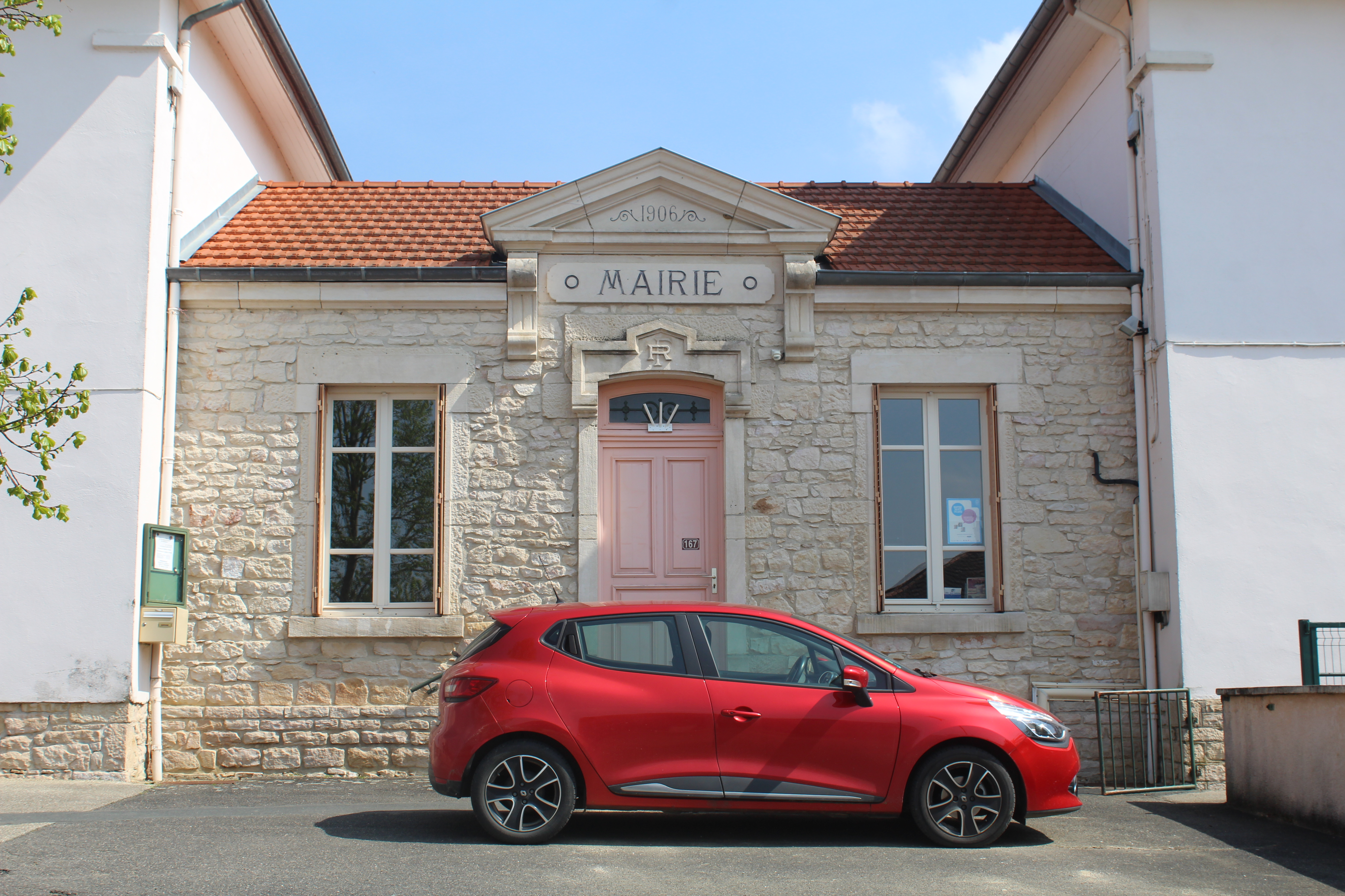 Mairie de Béréziat.